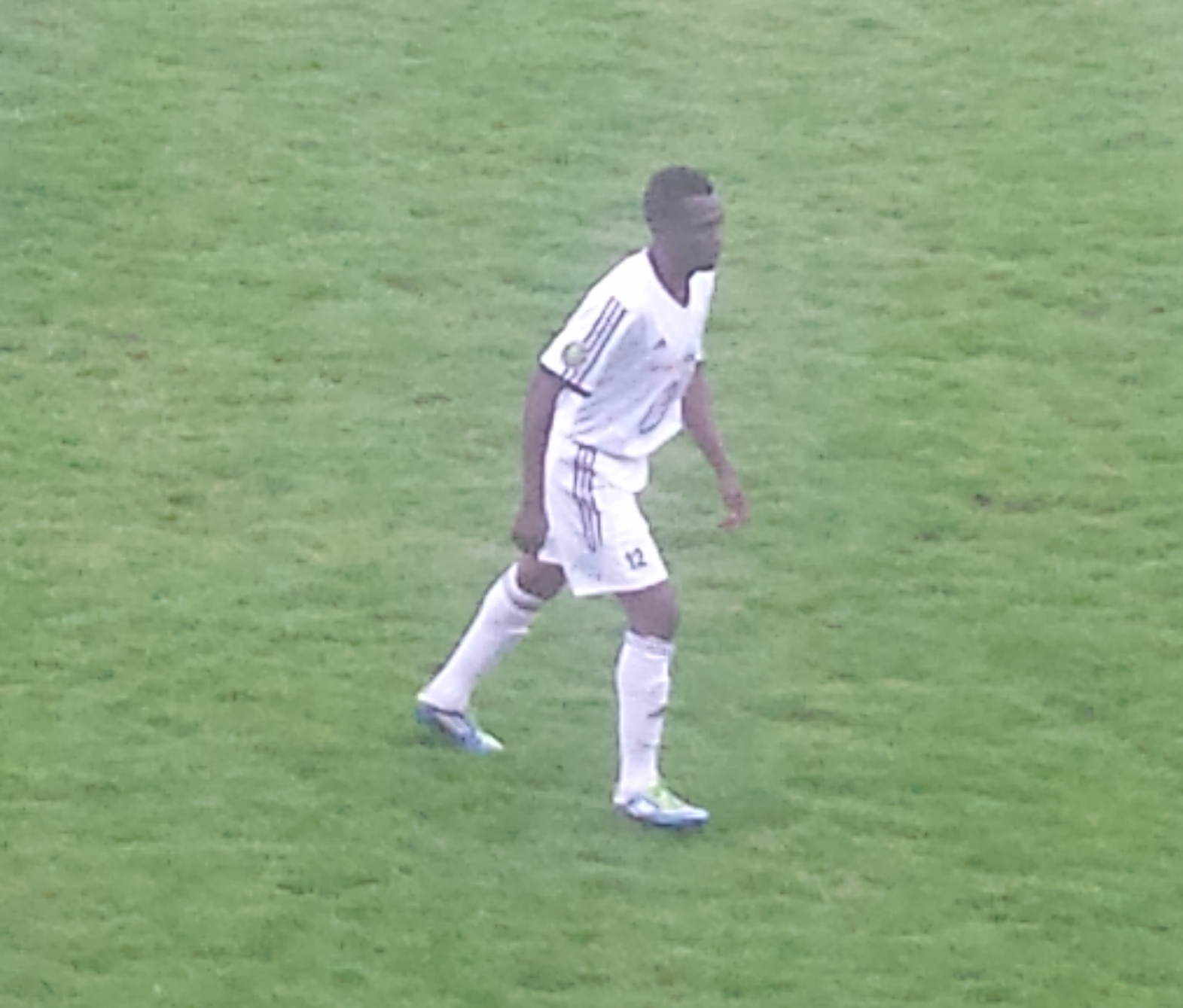 Oscar Olou lors du match Arras / Romorantin, le 25 avril 2015, au Stade Degouve-Brabant d'Arras, comptant pour la vingt-sixième journée du championnat de France amateur de football ou CFA (quatrième division française).